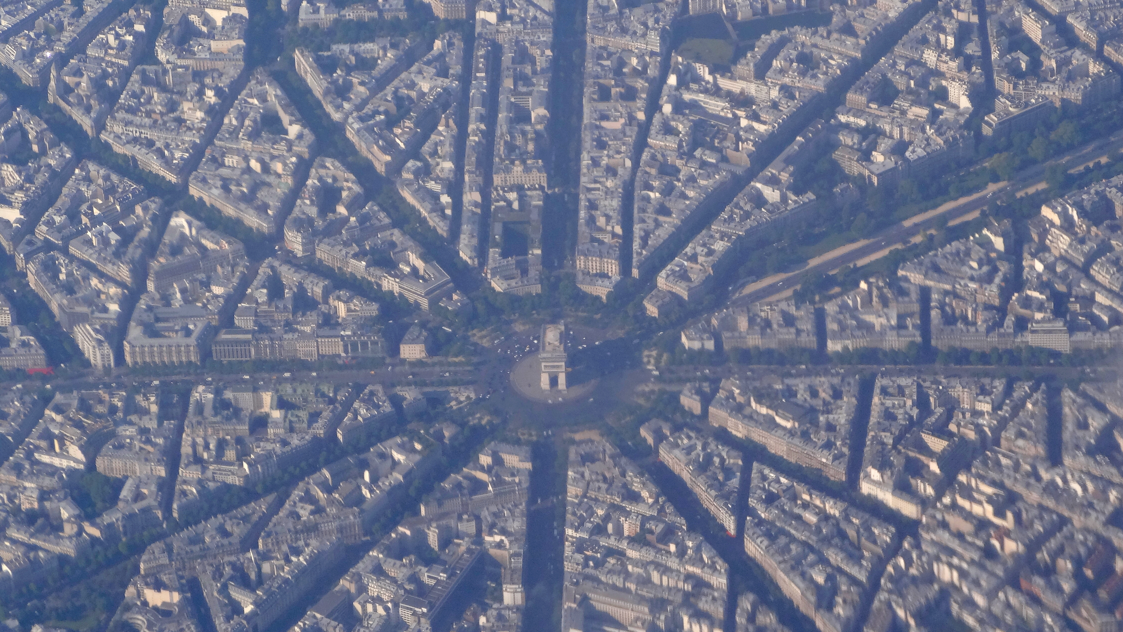 France, Arc de Triomphe de l'Étoile during an apporach into Charles de Gaulle airport